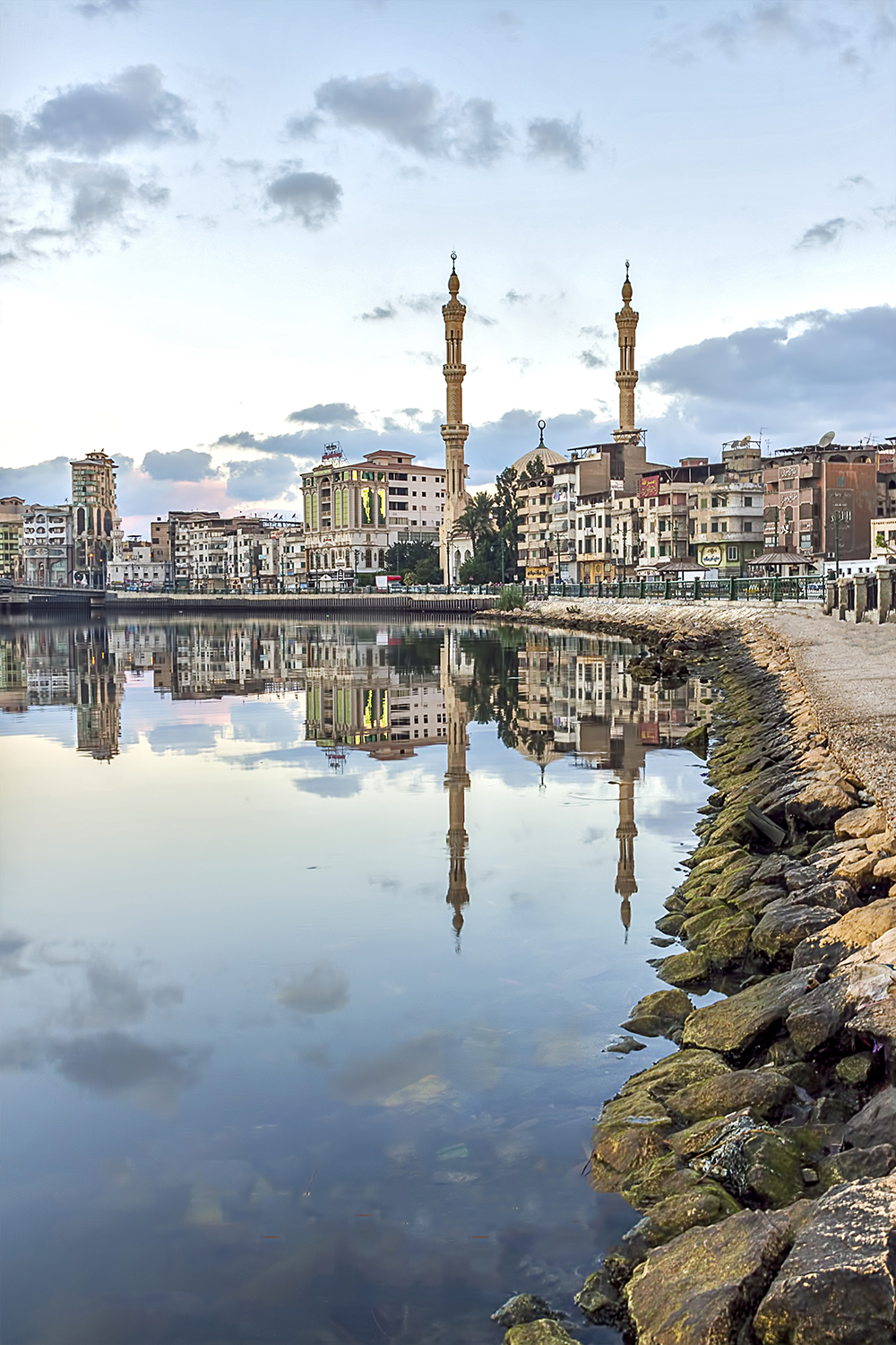 مسجد البحر منارة عروس الدلتا دمياط في إنعكاس رائع وقت الشروق وفي حالة هدوء نادرة للشارع والرياح معاً